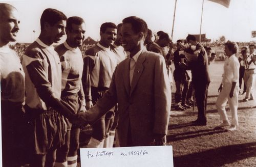 Macth amical contre l'équipe Nationale du Vietnam.